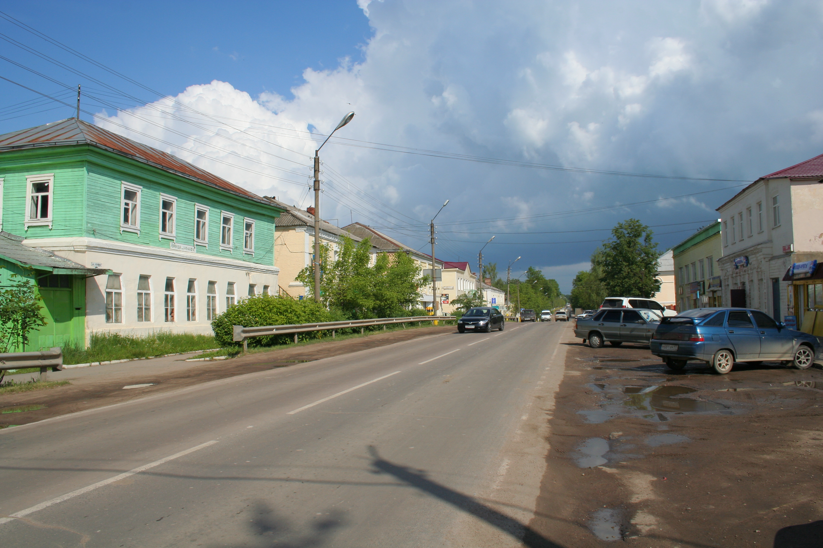 Stadt Medyn, Oblast Kaluga, Russland. Lenin-Prospekt.